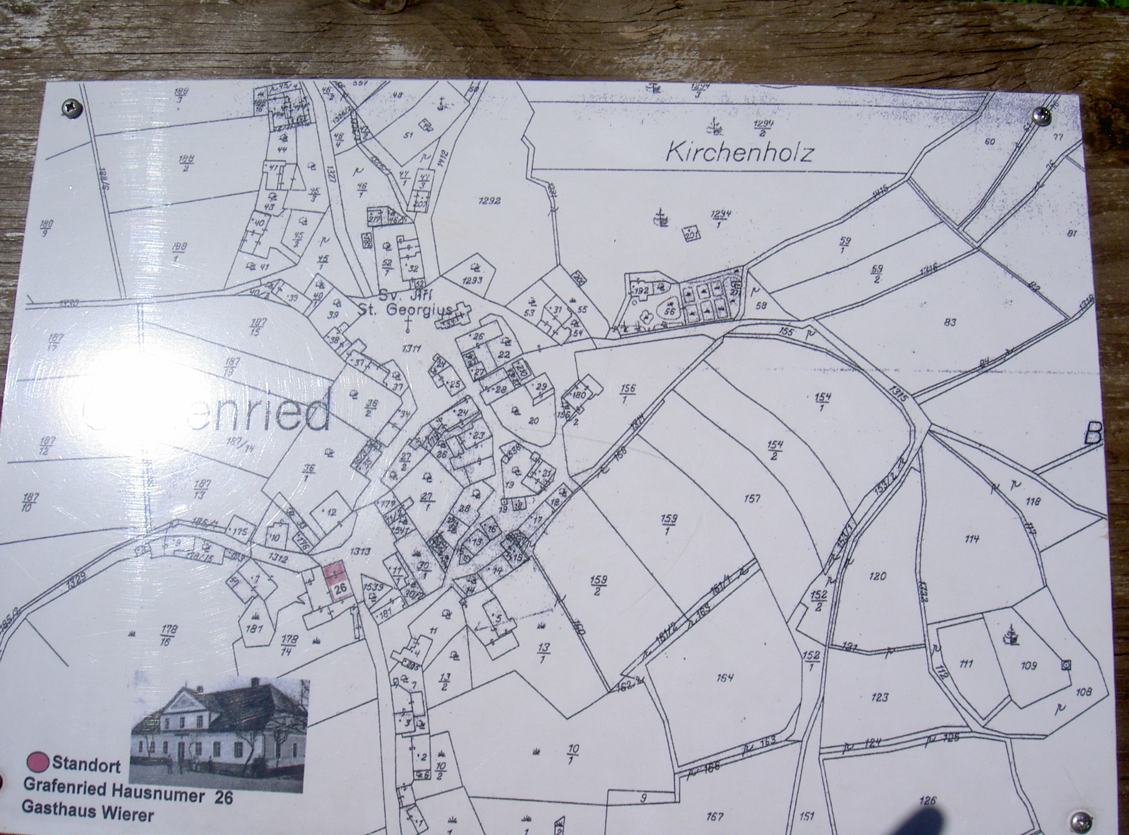 Grafenried (Lučina)